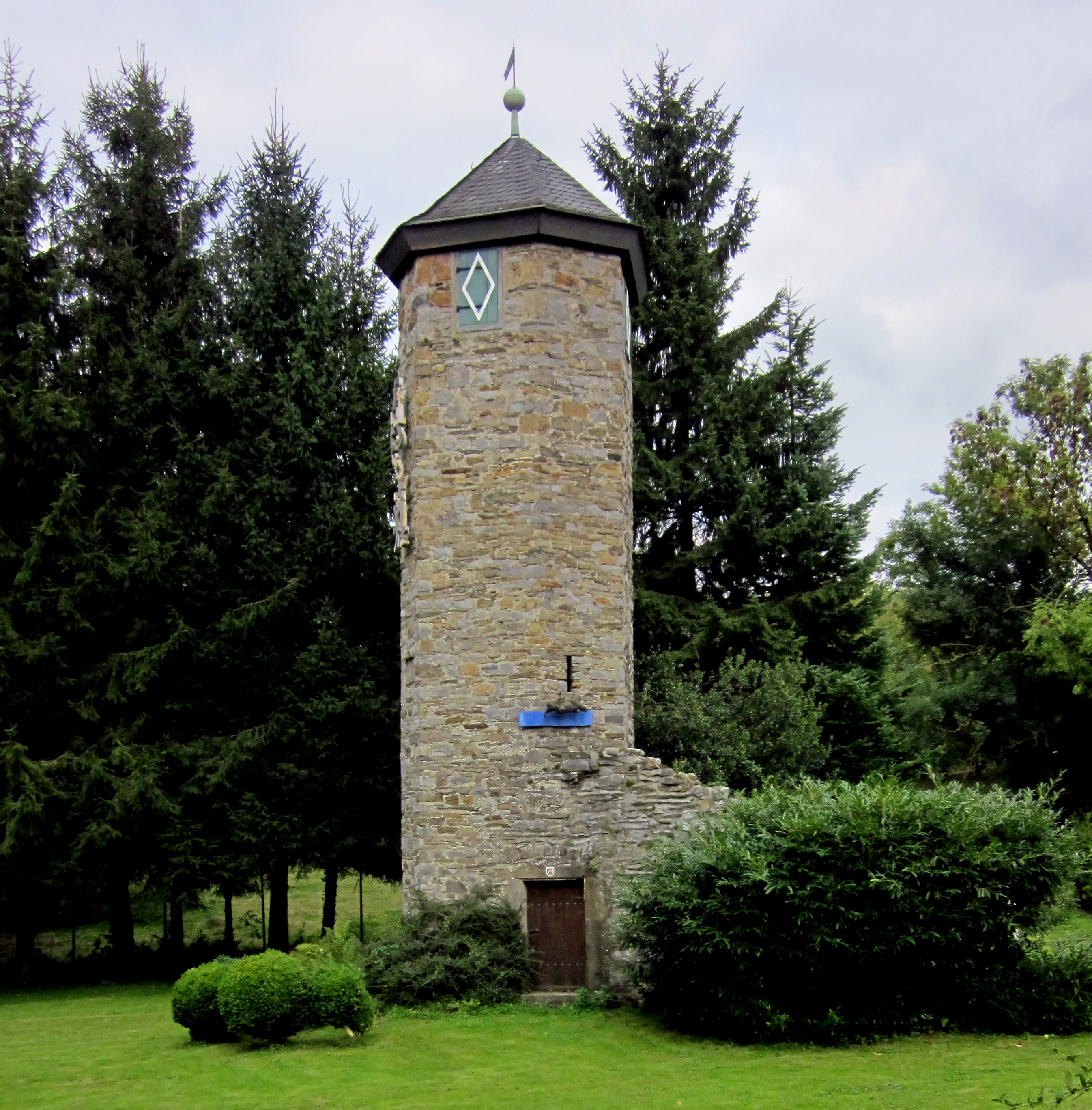 Ein Wehrturm ist der einzige Überrest der ehem. „Wasserburg“ Hetterscheidt This is a photograph of an architectural monument.